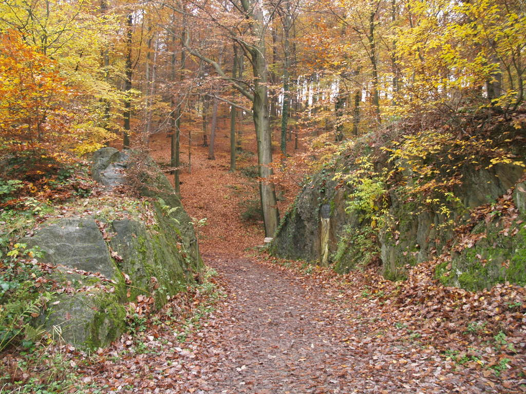 Der Felsendurchbruch Teufelsfelsen im Schimmelbusch in Remscheid-Reinshagen.